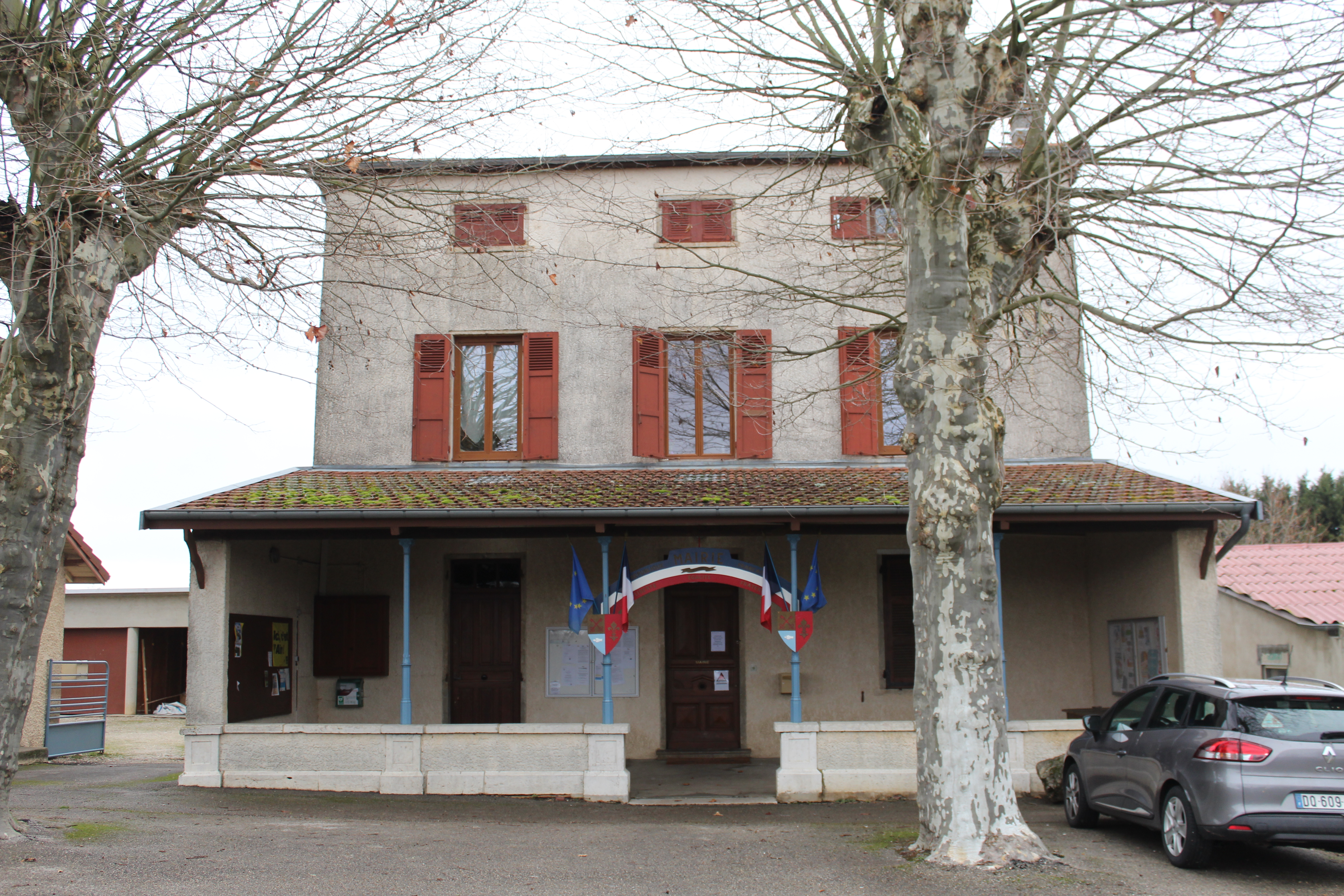 Mairie de Birieux.